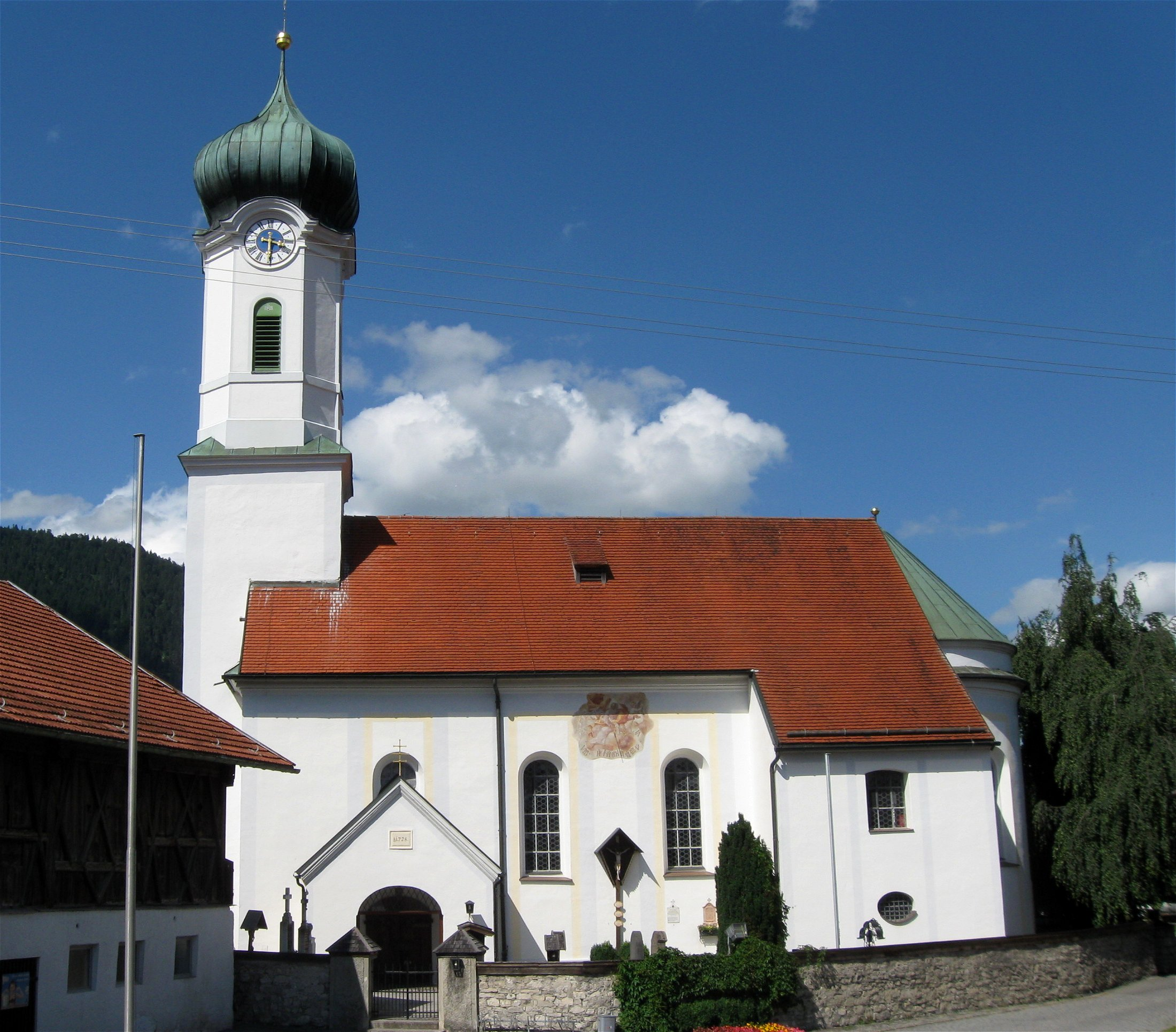 Schulstraße 2, Farchant, Kath. Pfarrkirche St. Andreas, barocker Saalraum mit eingezogenem Chor und westlichem Zwiebelturm, von Johann Mayr d.J., 1728/29; mit Ausstattung. Friedhof, mit schmiedeeisernen Grabkreuzen; Friedhofsmauer, Naturstein.